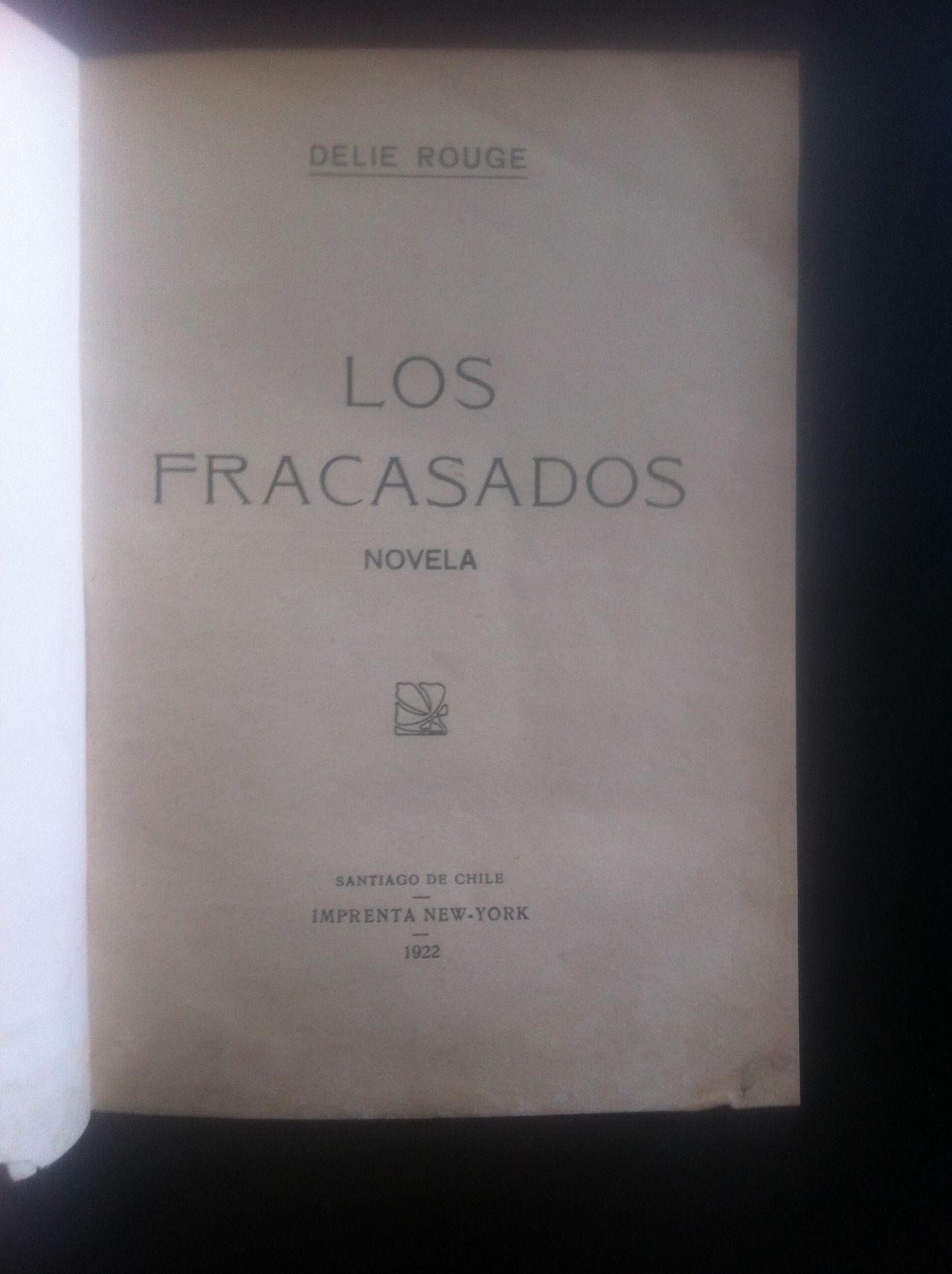 Los Fracasados. Delie Rouge (Delia Rojas Garces de White). Santiago de Chile, New York 1922. Primera Edición, libro muy escaso y raro.